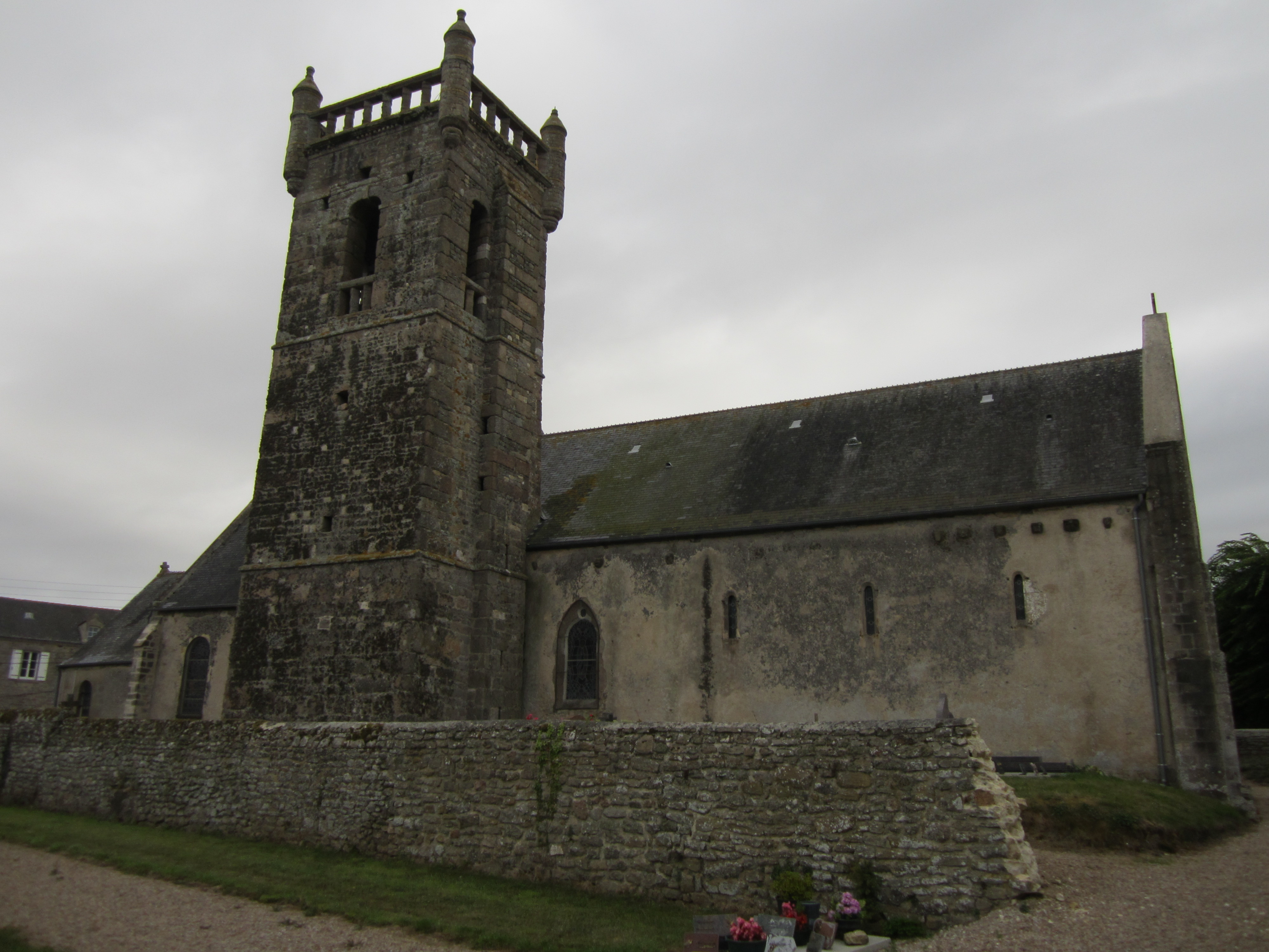 Église Saint-Martin-et-Sainte-Trinité de Néville-sur-Mer, Manche .